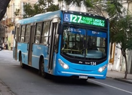 Mercedes-Benz O-500 perteneciente a la empresa El Cacique Ros, explotador de la línea 127.